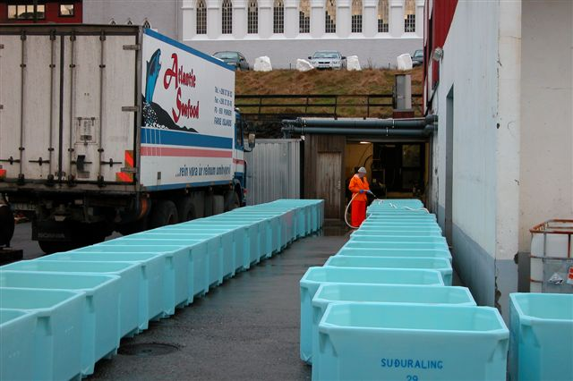 Fiskefabrik i Vágur